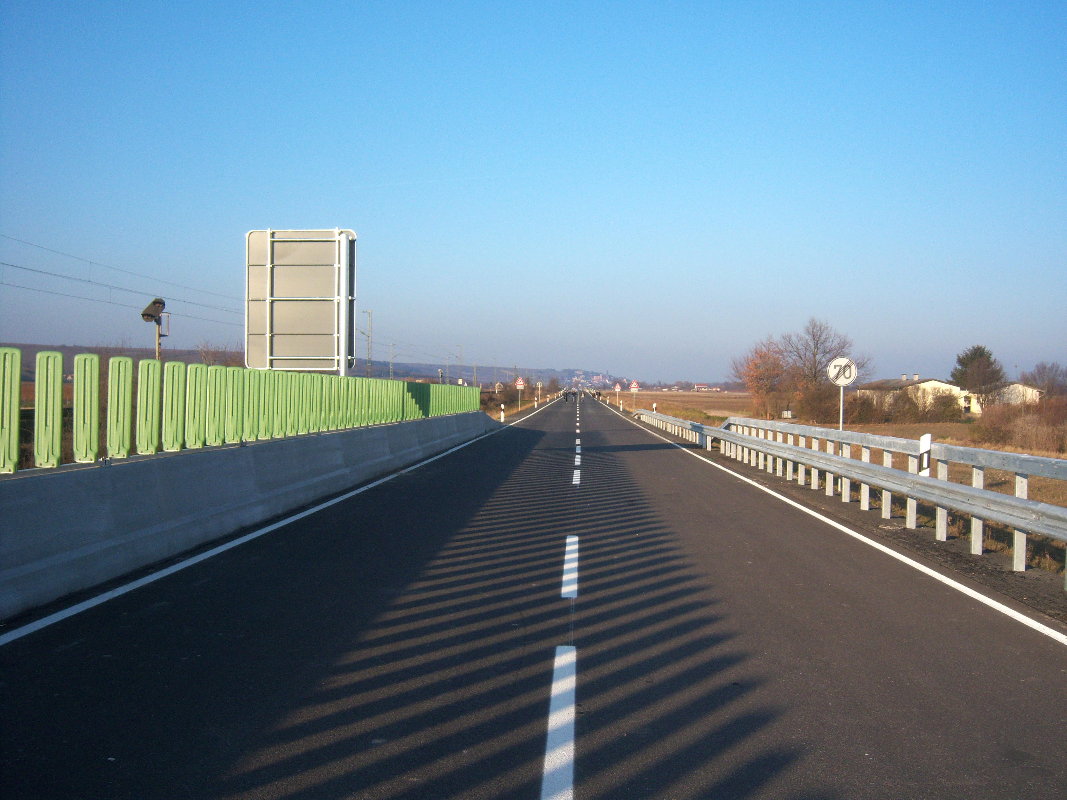 Bundesstraße 9 in Rheinhessen bei Guntersblum